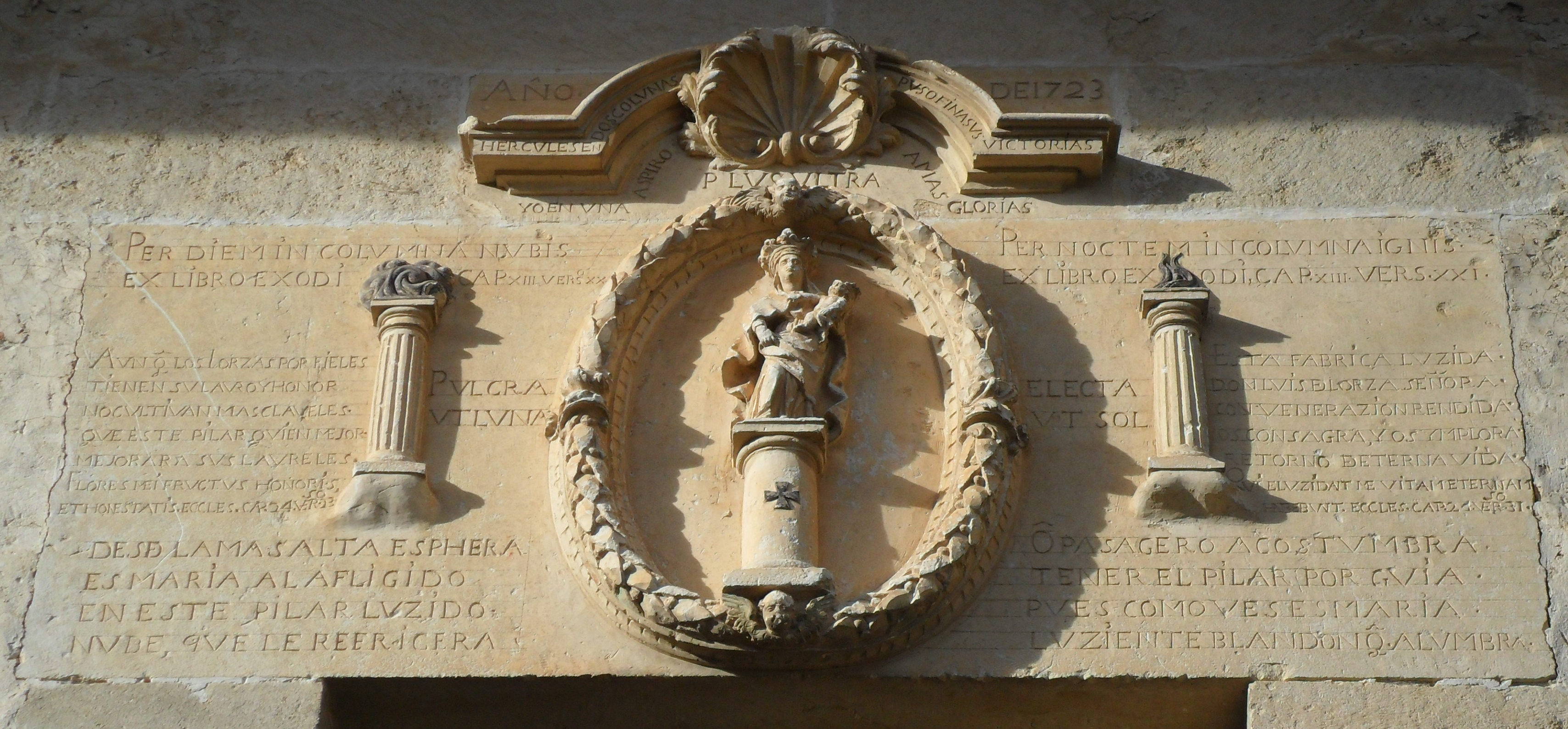 Imagen de la virgen del Pilar en una casa barroca de 1723 en Marquinez